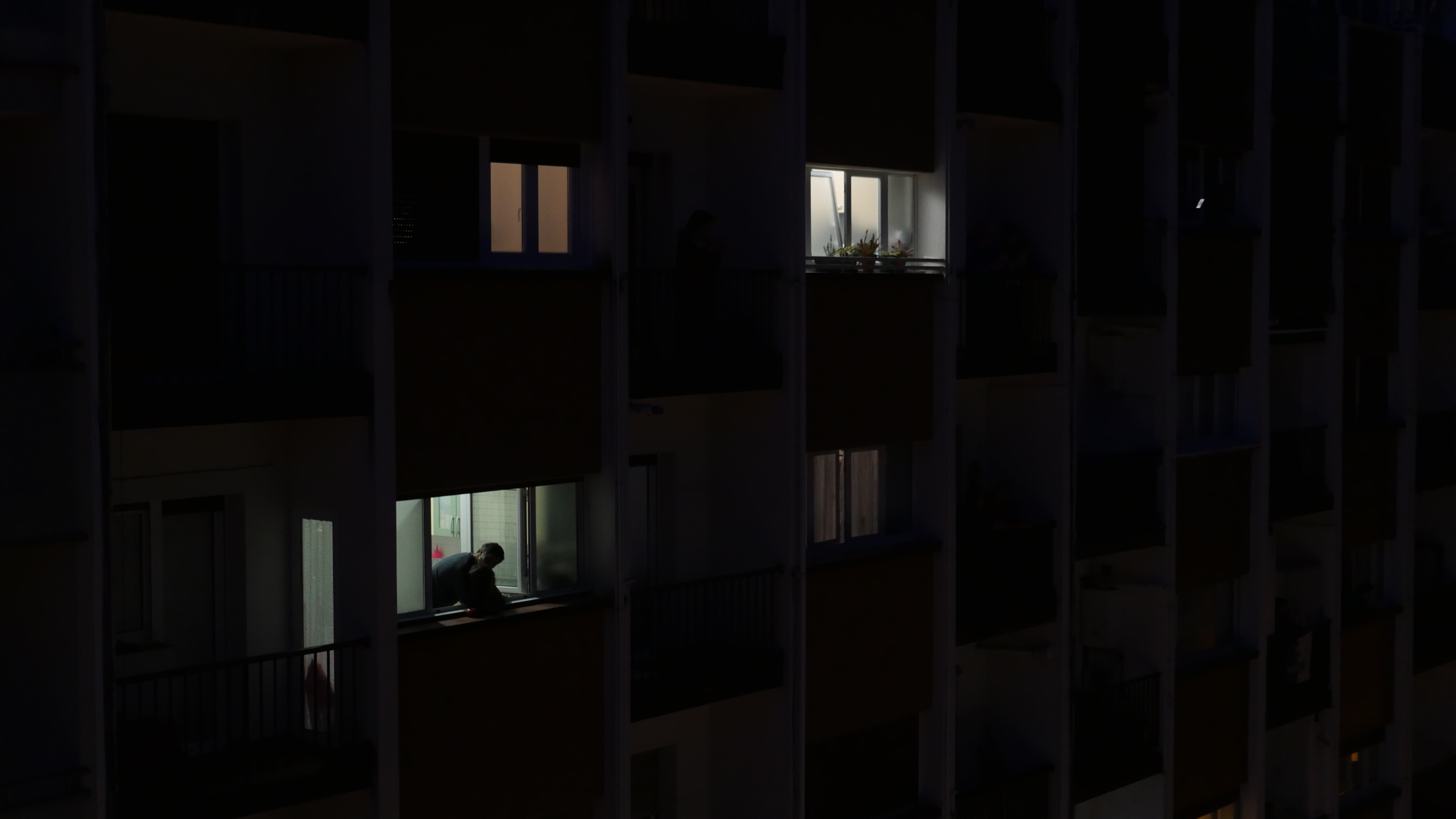 COVID 19 pandemia egoera Donostian, bizilagunak 20:00etako txalo saioan.